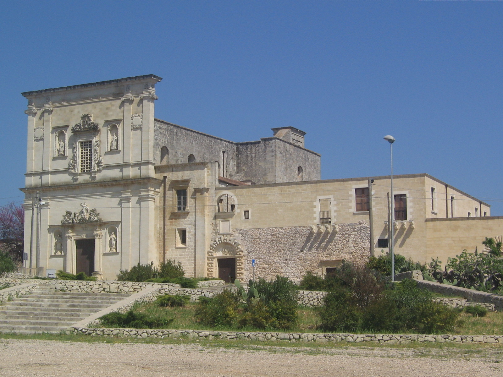 Muro Leccese: chiesa e convento dei Domenicani.